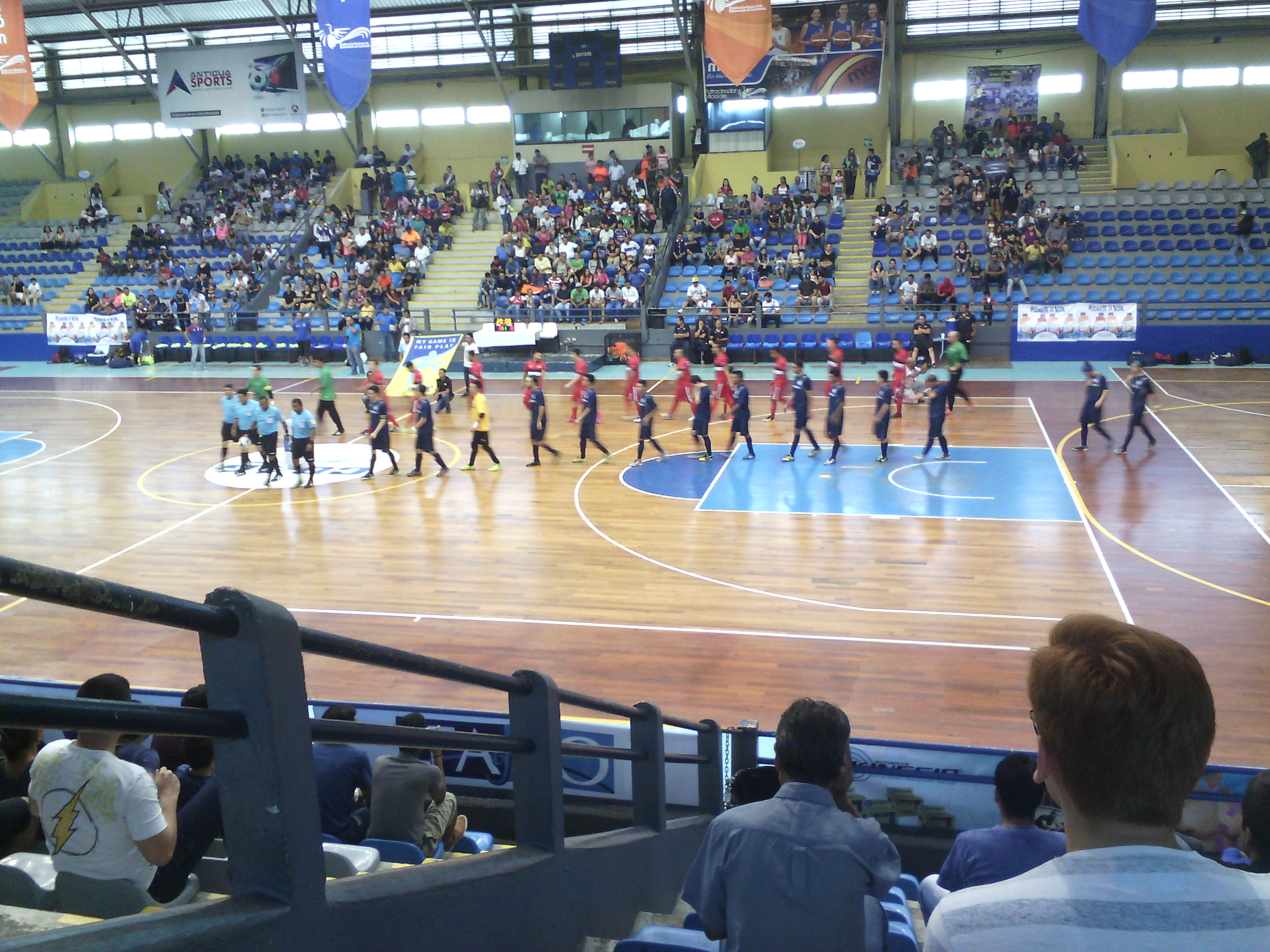 Gimnasio Teodoro Palacios Flores zona 5 Ciudad de Guatemala